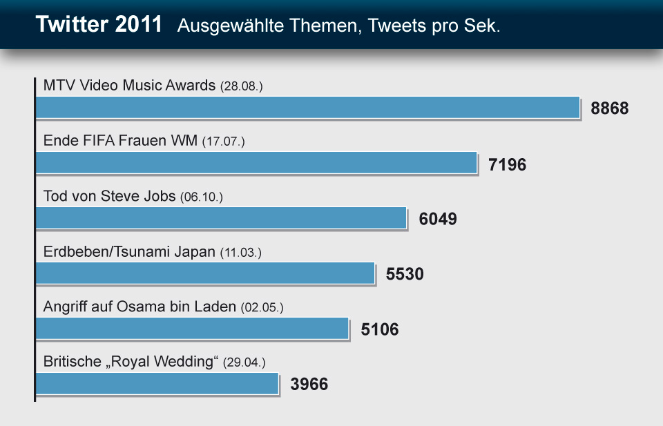 Die Grafik zeigt einen Auszug aus dem Twitter-Jahresrückblick 2011 mit der Anzahl der Tweets pro Sekunde zu ausgewählten Themen. [1]